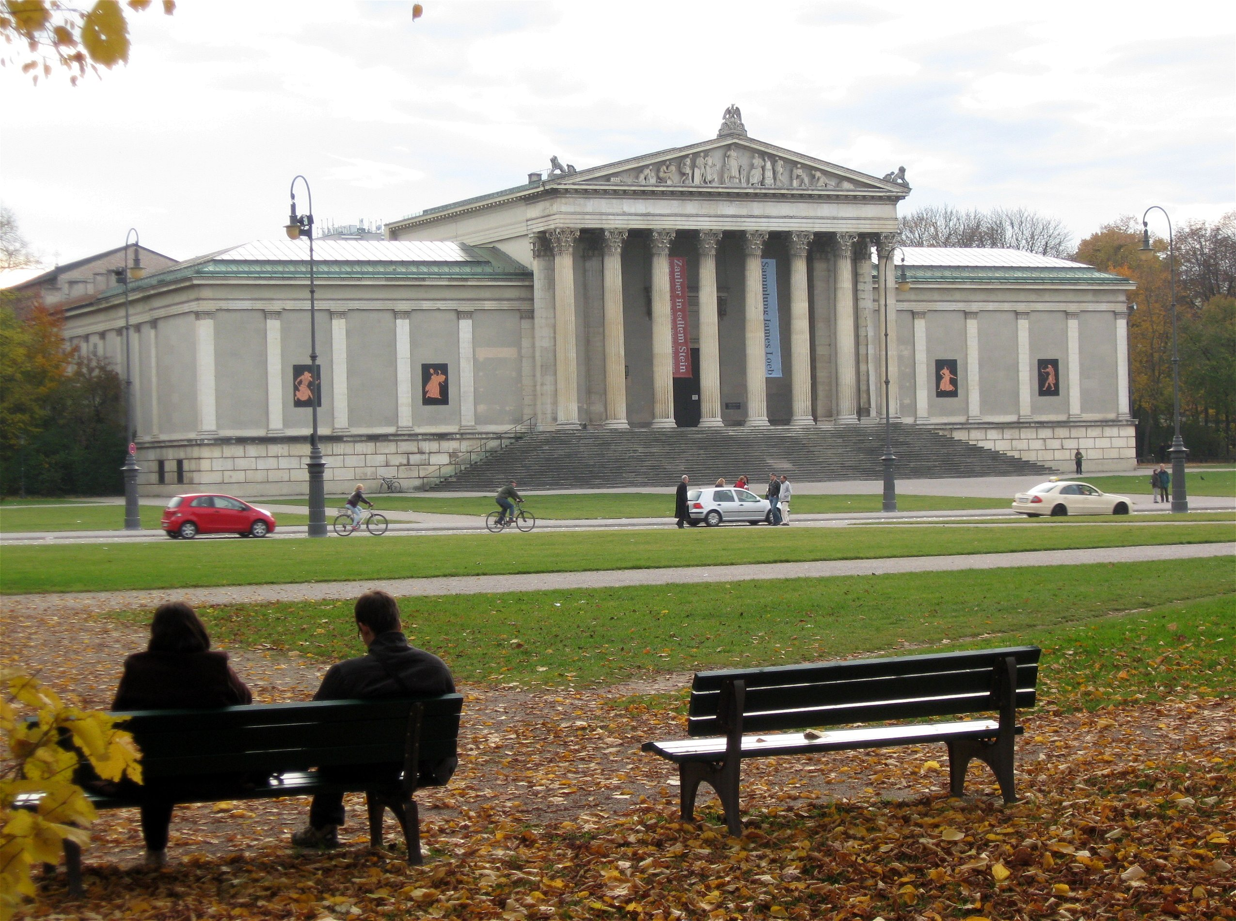 Staatliche Antikensammlungen, Königsplatz, München